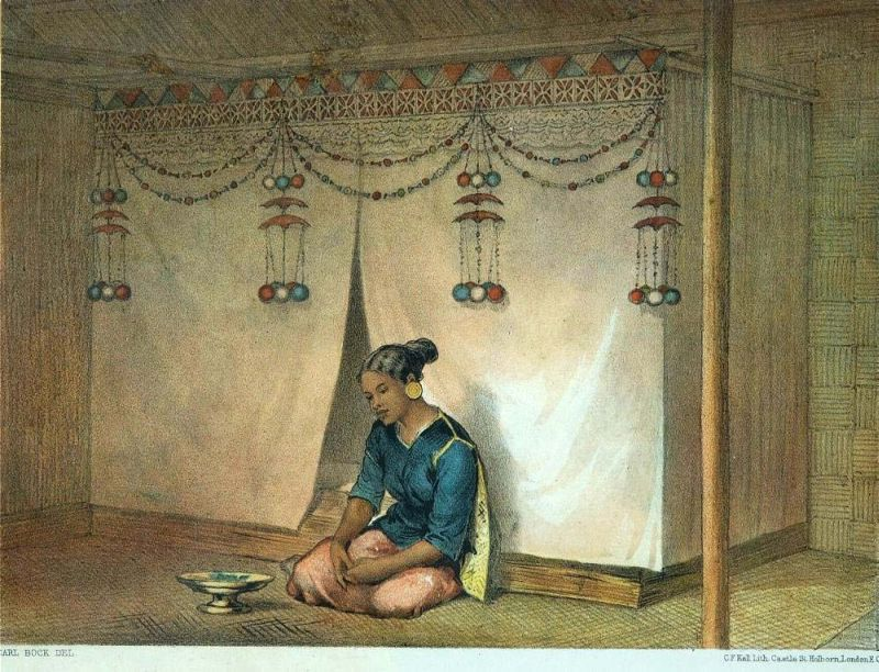 Litho. Carl Bock maakte in 1879 en 1880 een reis in Oost- en Zuid-Borneo, van Koetei naar Banjermasin. Over zijn ervaringen heeft hij een boek gemaakt.. Kleurenlitho getiteld "Jong gehuwde Maleische vrouw"